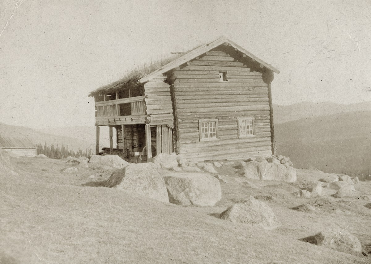 Nestegard i Hol.